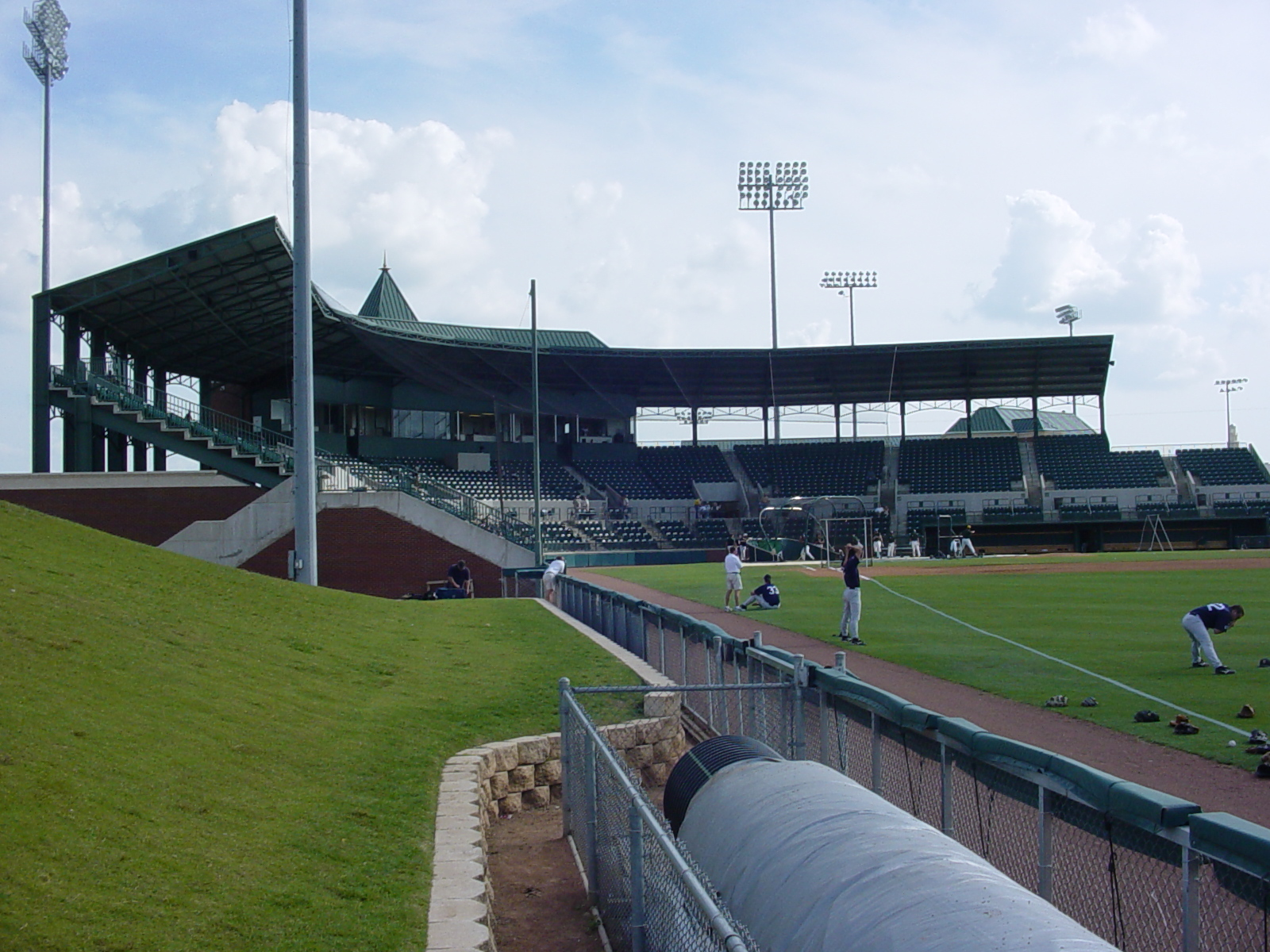 taken 5.18.04 Rice vs. Baylor